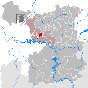 Schmorda in Thuringia - Saale-Orla-Kreis